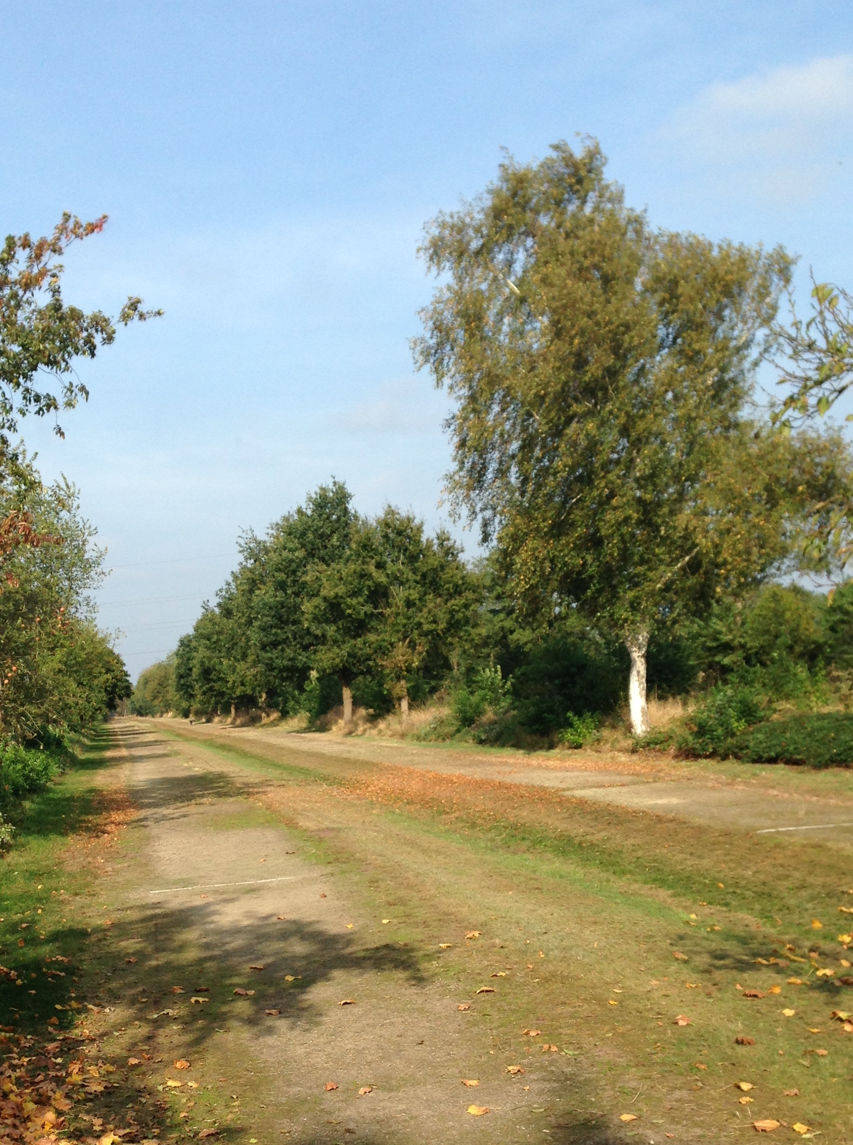 Eine der 5 Kloatscheeterbahnen auf der Fritz-Hilkmann-Sportkloatscheeter-Anlage in Klausheide